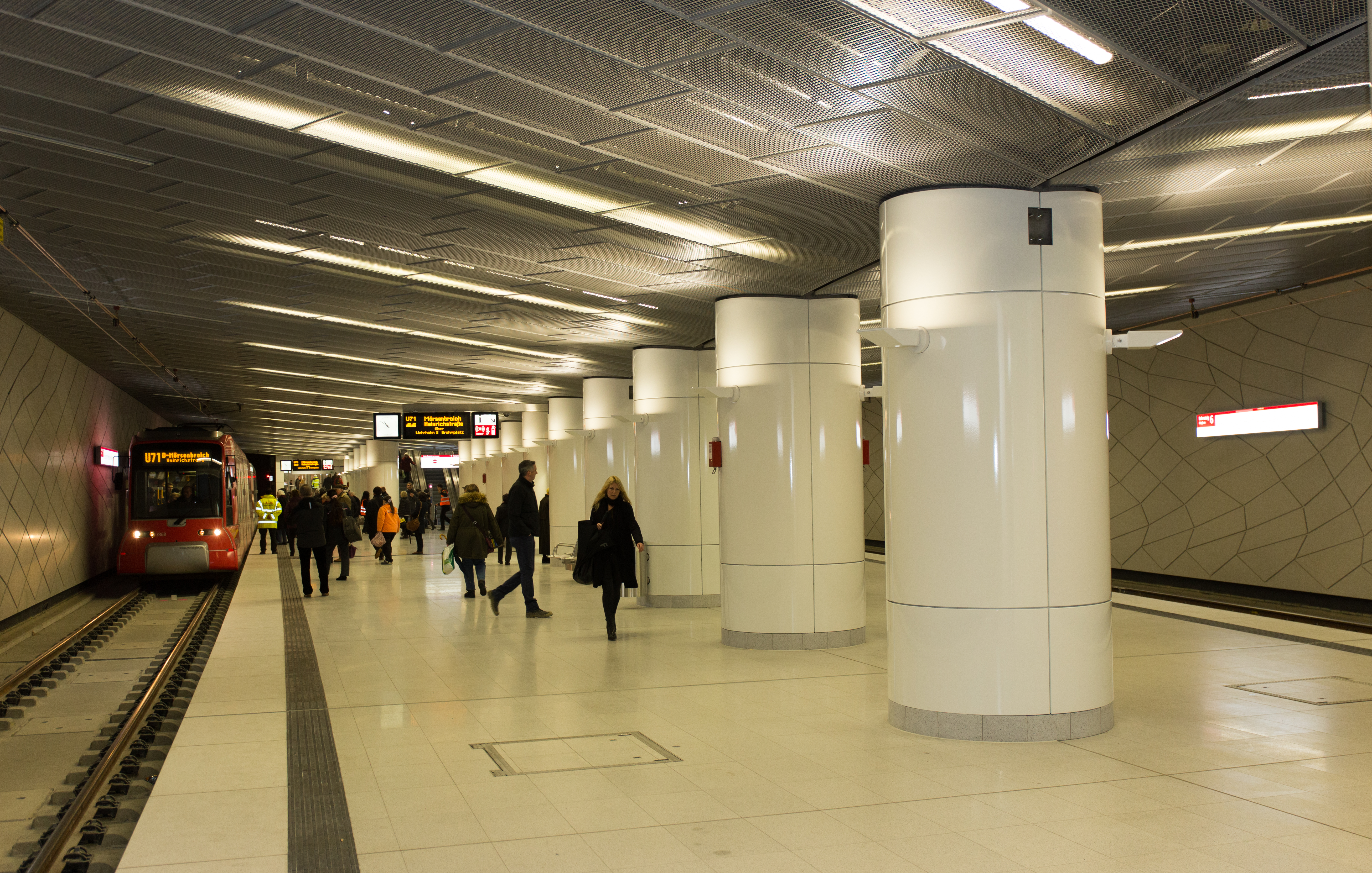 Wehrhahnlinie, Heinrich-Heine-Allee neue Plattform